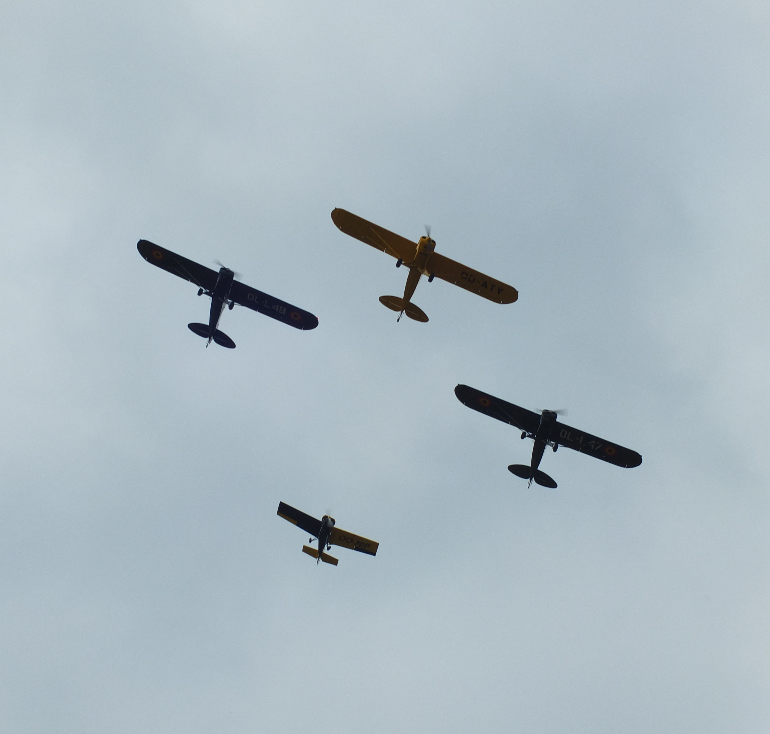 Formatie van Piper vliegtuigen op het Brasschaat Flying Festival.